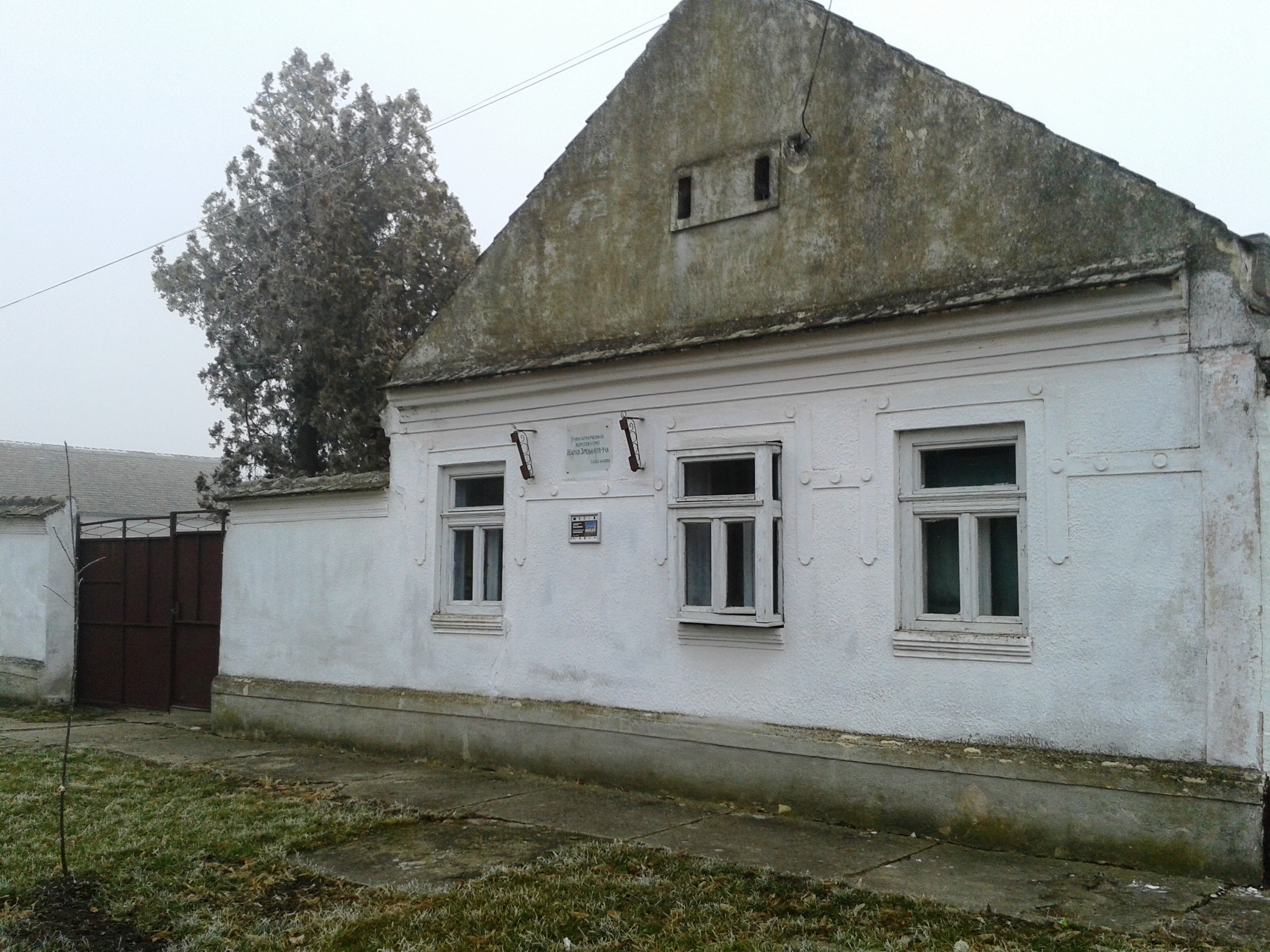 Kuća Žarka Zrenjanina u Izbištu